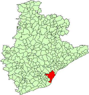 Situación del término municipal de Barcelona respecto a la provincia de Barcelona, en España.